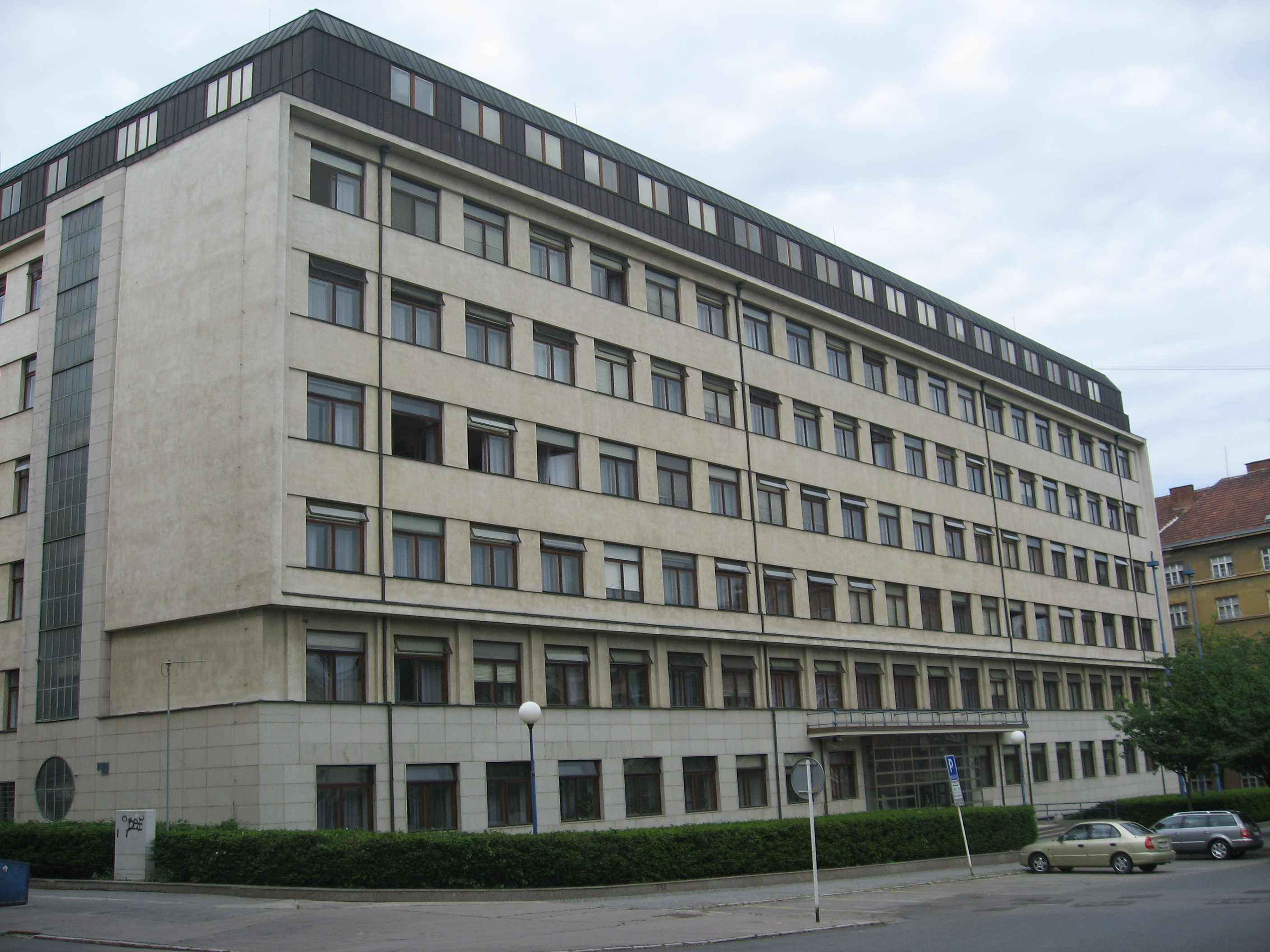 Budova Nejvyššího soudu České republiky, Brno